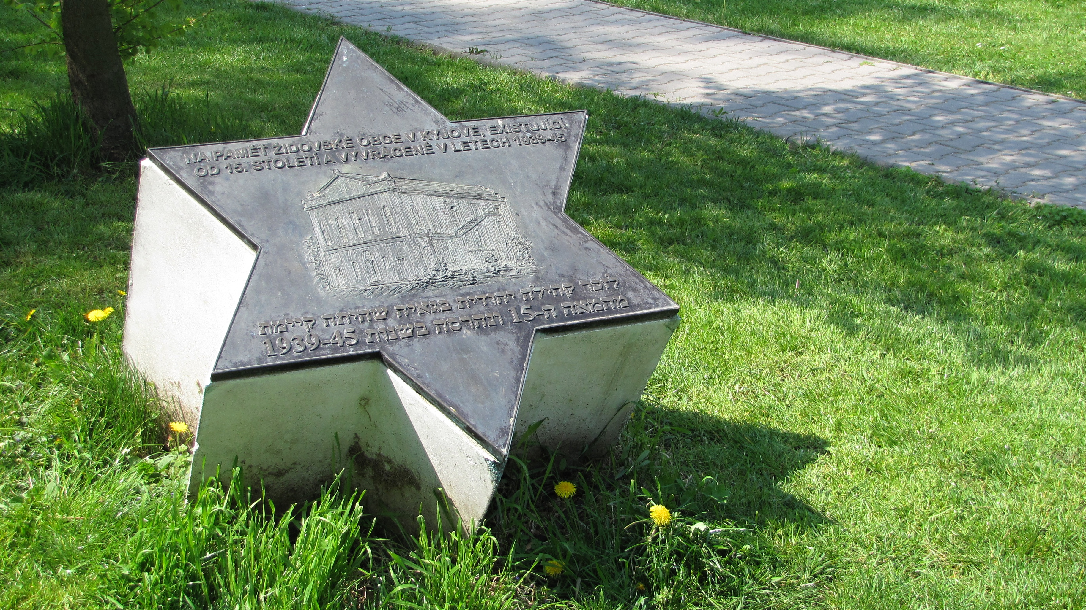 Pomník ve tvaru Davidovy hvězdy připomínající kyjovskou židovskou obec. Podle návrhu brněnského architekta Jana Klenovského vytvořil sochař Nikos Armutidis v roce 2002. Je umístěn za kulturním domem, kde do roku 1962 poblíž stávala synagoga. Text: Na paměť židovské obce v Kyjově, existující od 15. století a vyvrácené v letech 1939–1945.